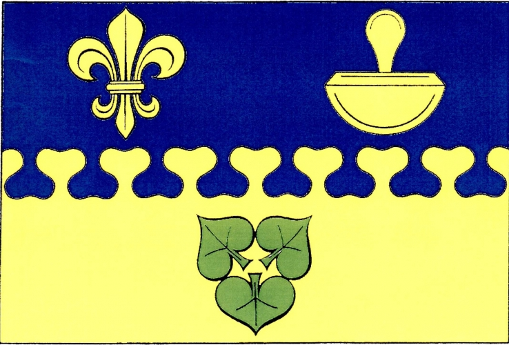 vlajka, Hodíškov, okres Žďár nad Sázavou